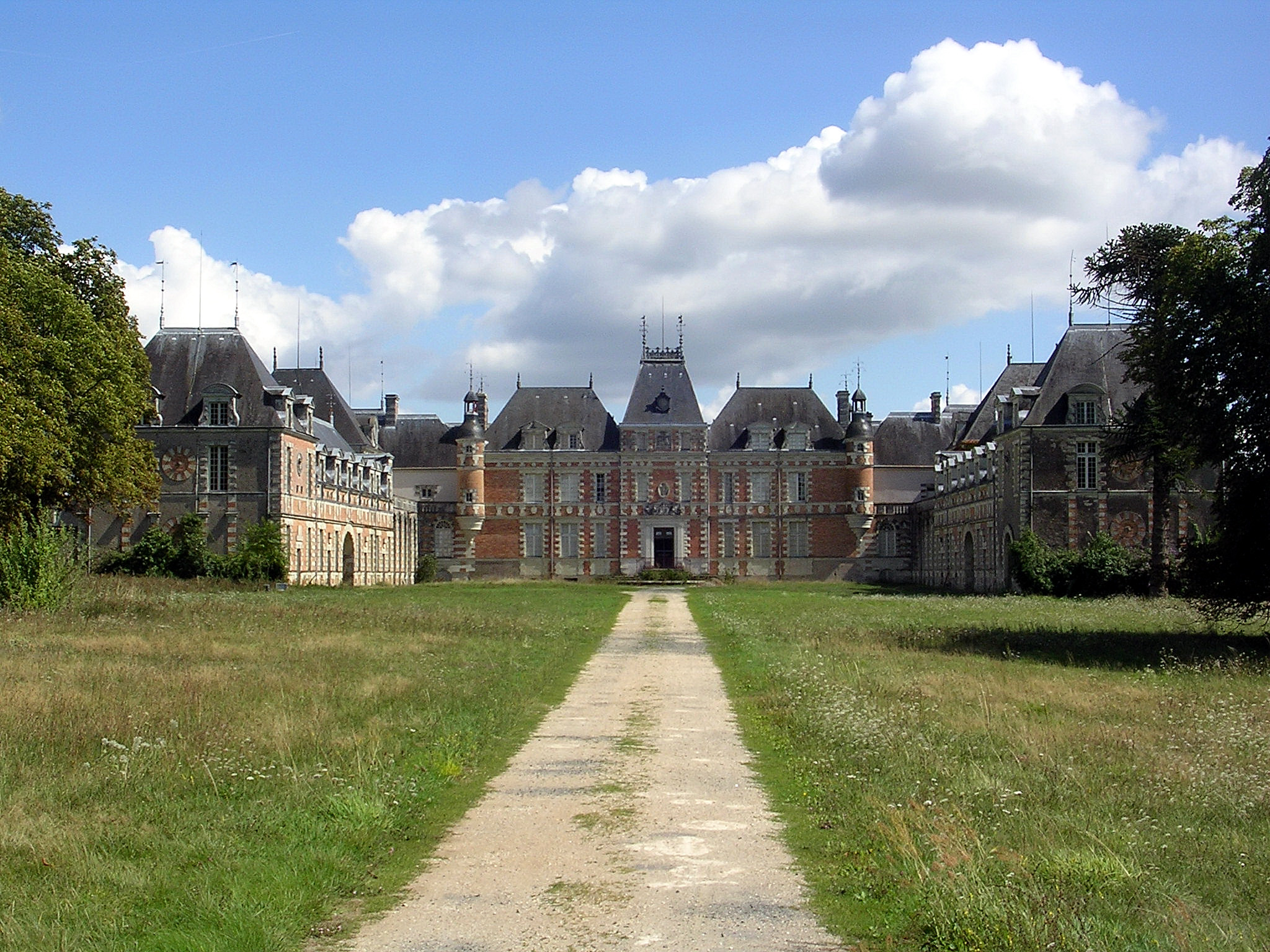 Château de Clermont au Cellier (Loire Atlantique, France)